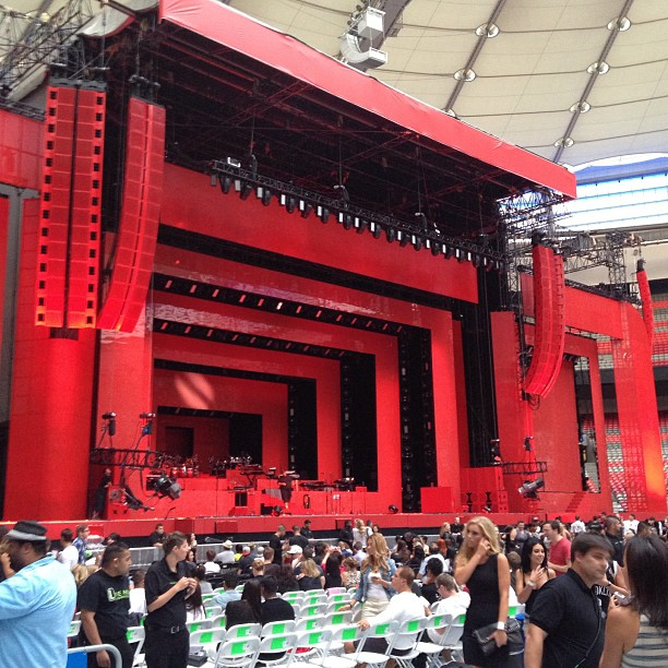 El escenario de la gira Legends of the Summer (de Justin Timberlake y Jay-Z) en el estadio BC Place de Vancouver Canadá el 31 de julio de 2013.